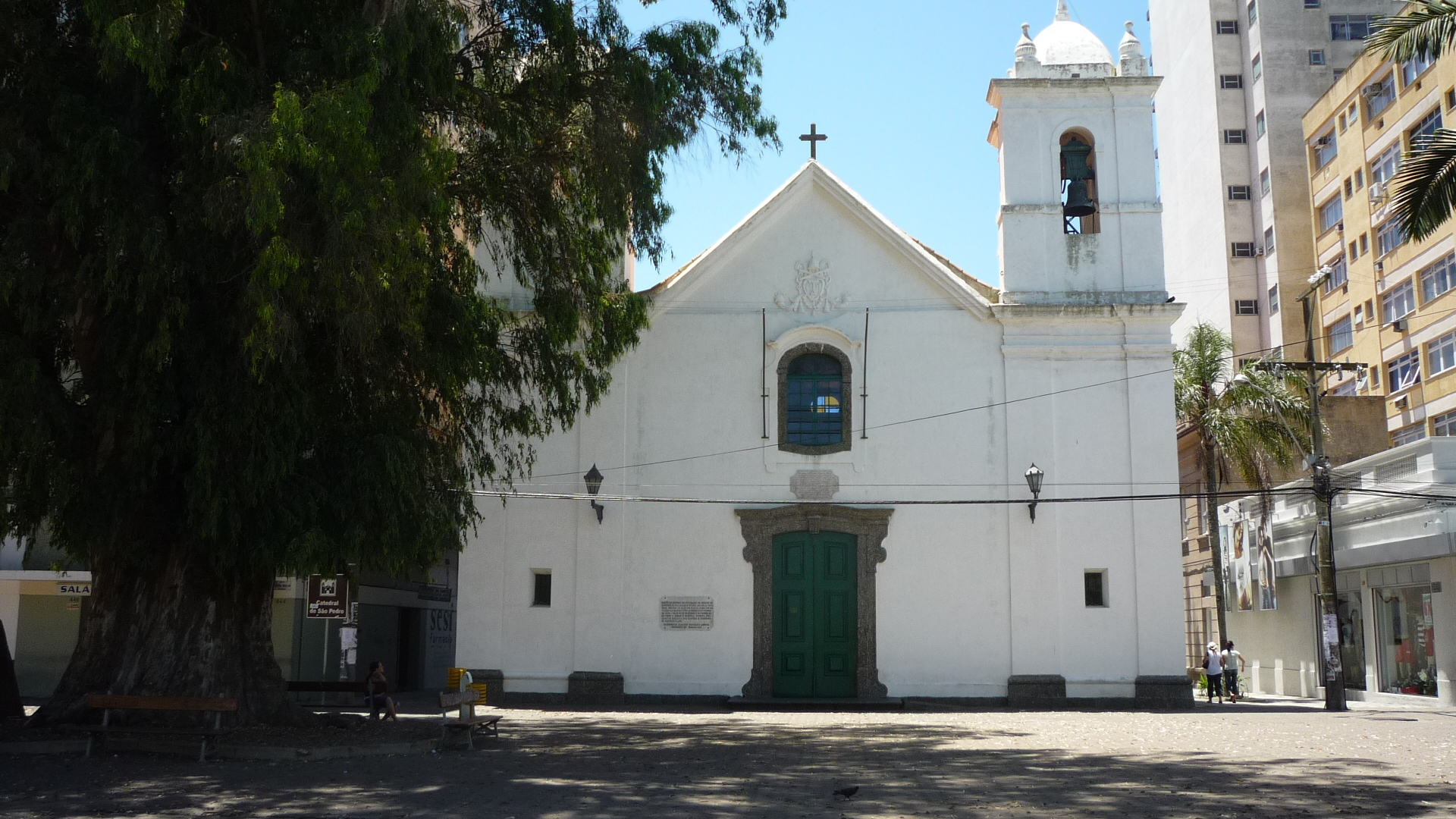 Igreja Matriz de São Pedro e Capela da Ordem Terceira de São Francisco